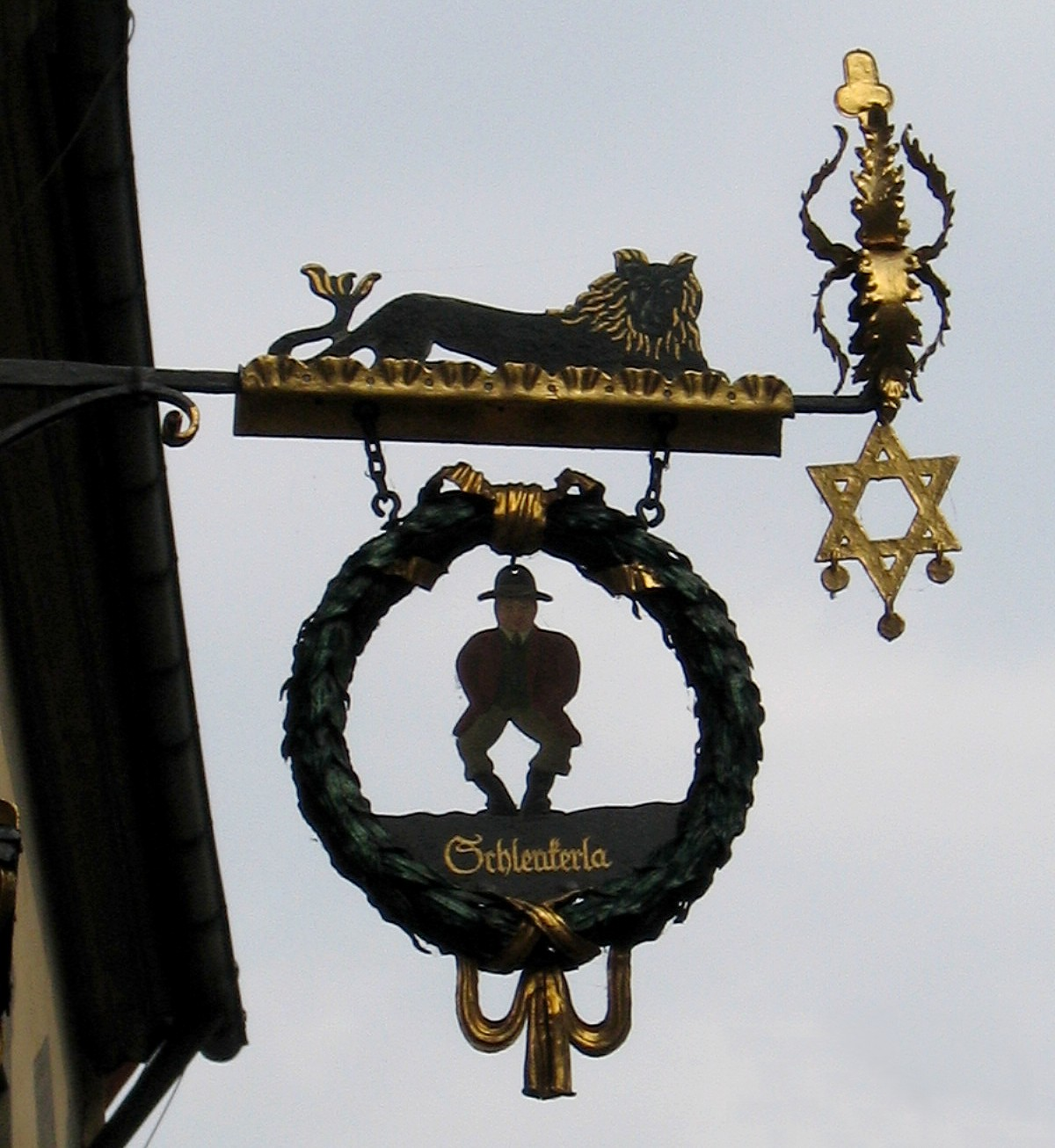 Description: Wirtshausschild mit einer Darstellung von Andreas Graser (Namensgeber "Schlenkerla"), einem Löwen als Hinweis auf den früheren Namen des Gebäudes (Zum blauen Löwen), rechts ein Hexagramm, das traditionelle Zeichen der fränkischen Bierbrauer (auch Brauerstern genannt) in Bamberg (Germany) Source: selbst fotografiert Date: 9. Sept. 2005 Author: Asio otus